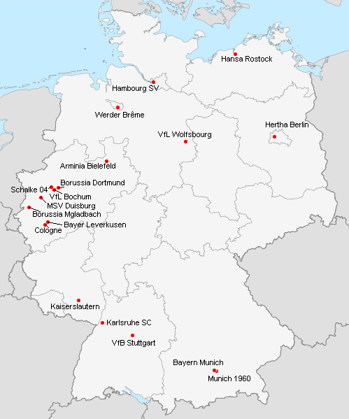 Répartition des clubs en 1.Bundesliga 1997-1998.